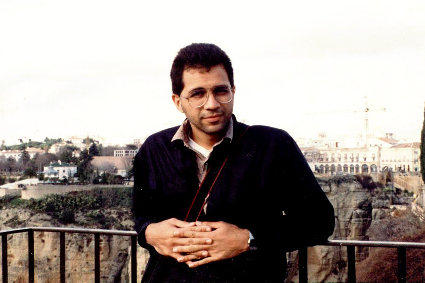 Rafael Francisco Góchez en 1993. Fotografía tomada en la ciudad malagueña de Ronda, España.